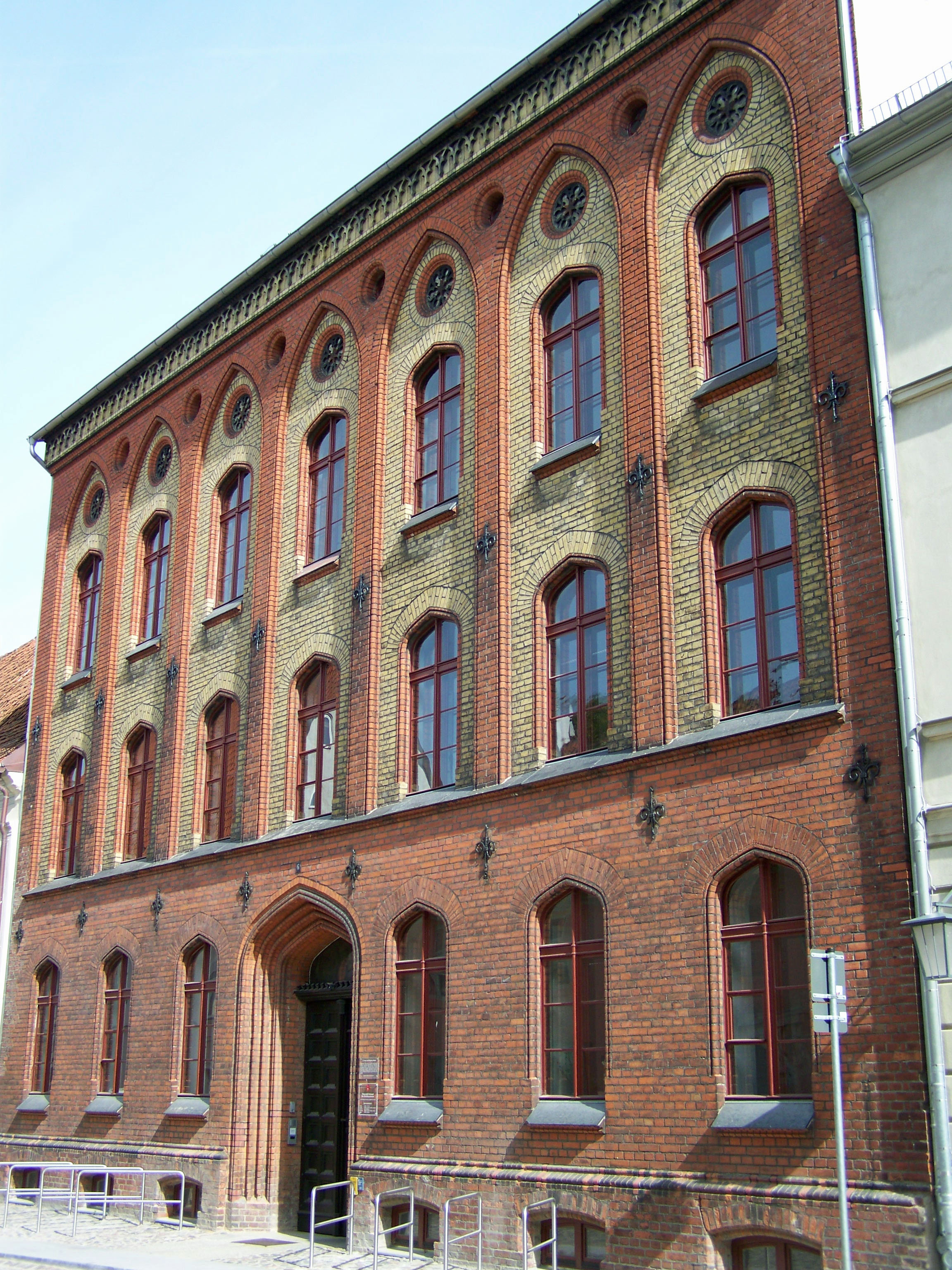 Gebäude bzw. Gebäudedetail in Stralsund. Straße und Hausnummer siehe Dateiname.